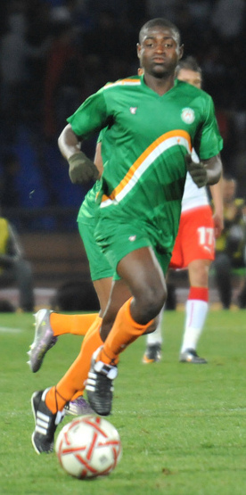 MAROC vs NIGER